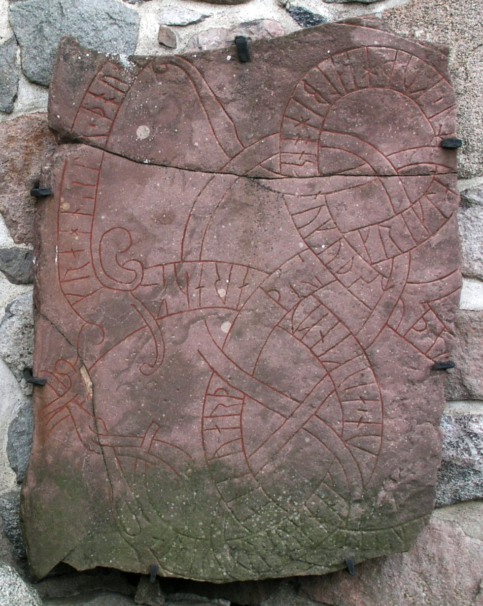 Husby-Sjuhundra kyrka, Norrtälje kommun, Diocese of Uppsala, Sweden. Runestone U540.